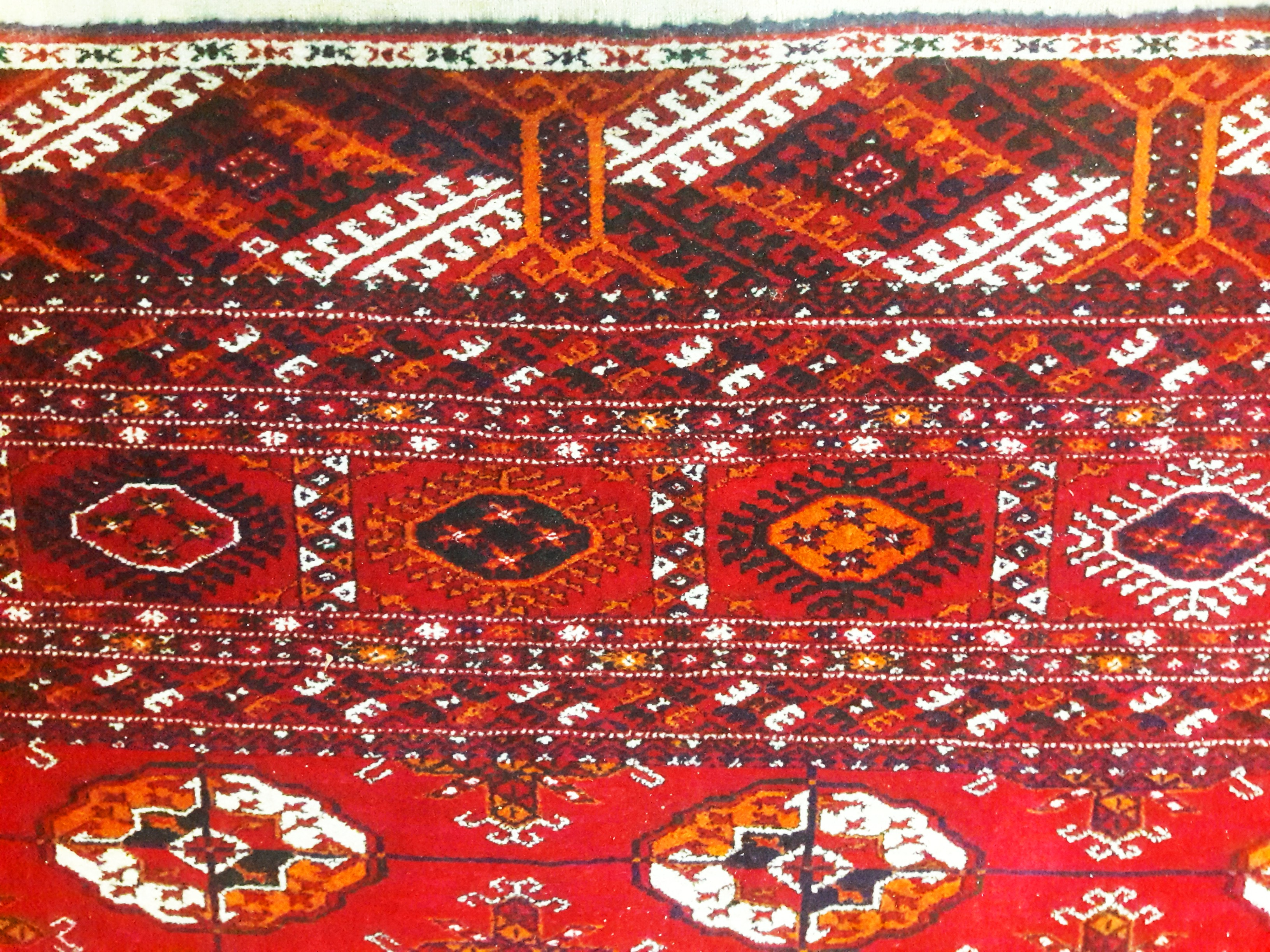 Fragment of a Turkmen carpet with national patterns